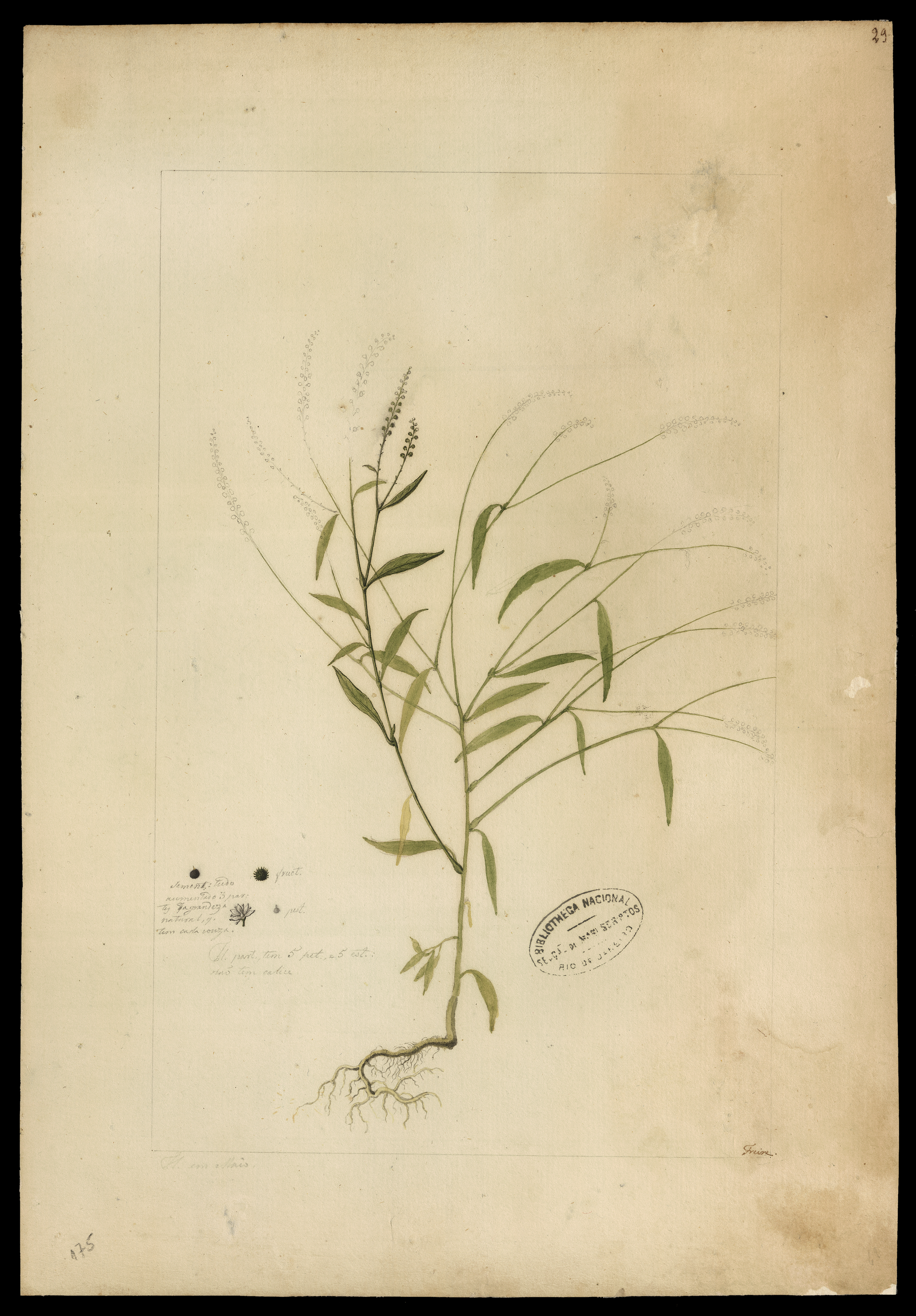 Obra da coleção Brasiliana Iconográfica.